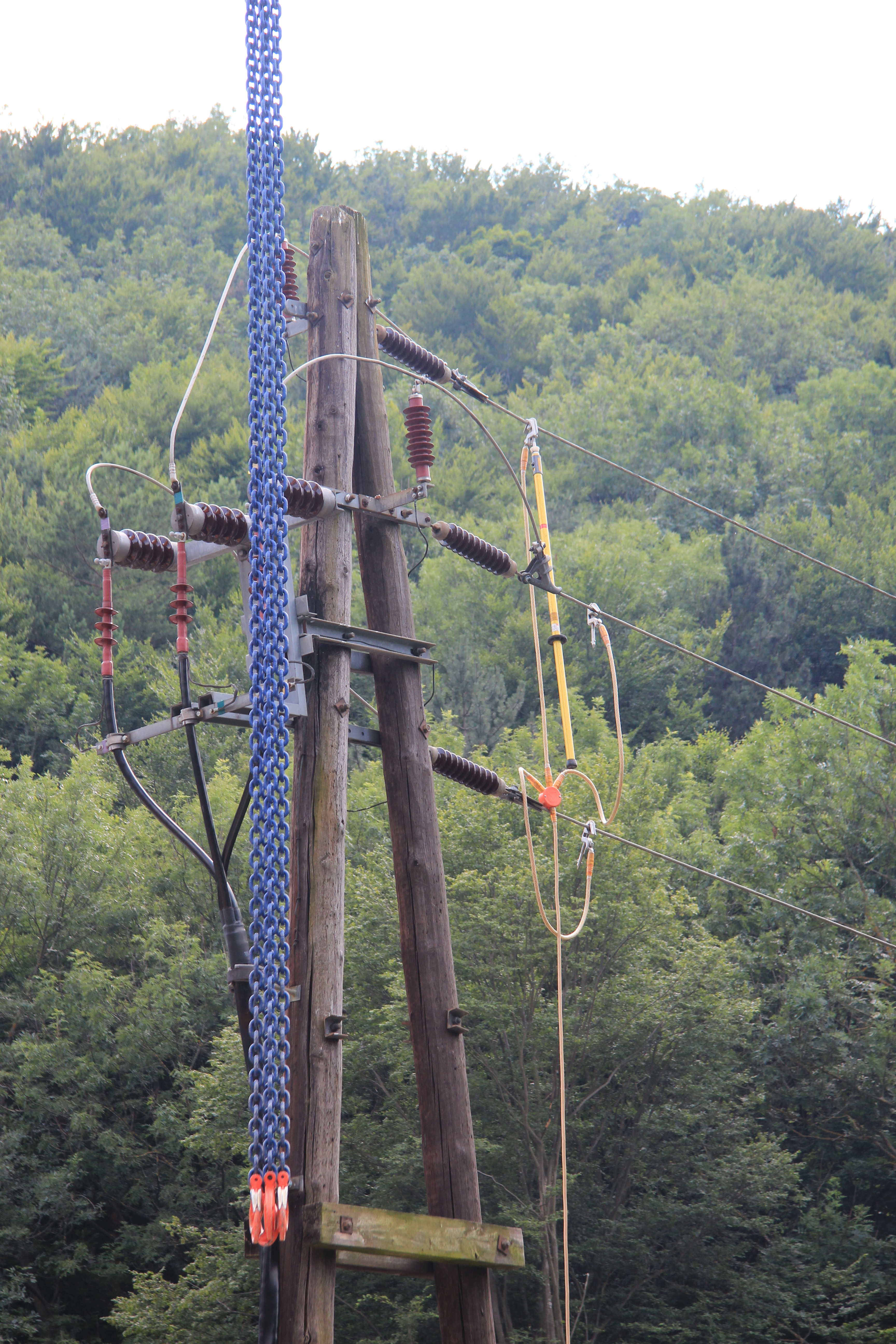 Geerdete 20kV-Leitung wegen benachbarter Kranarbeiten